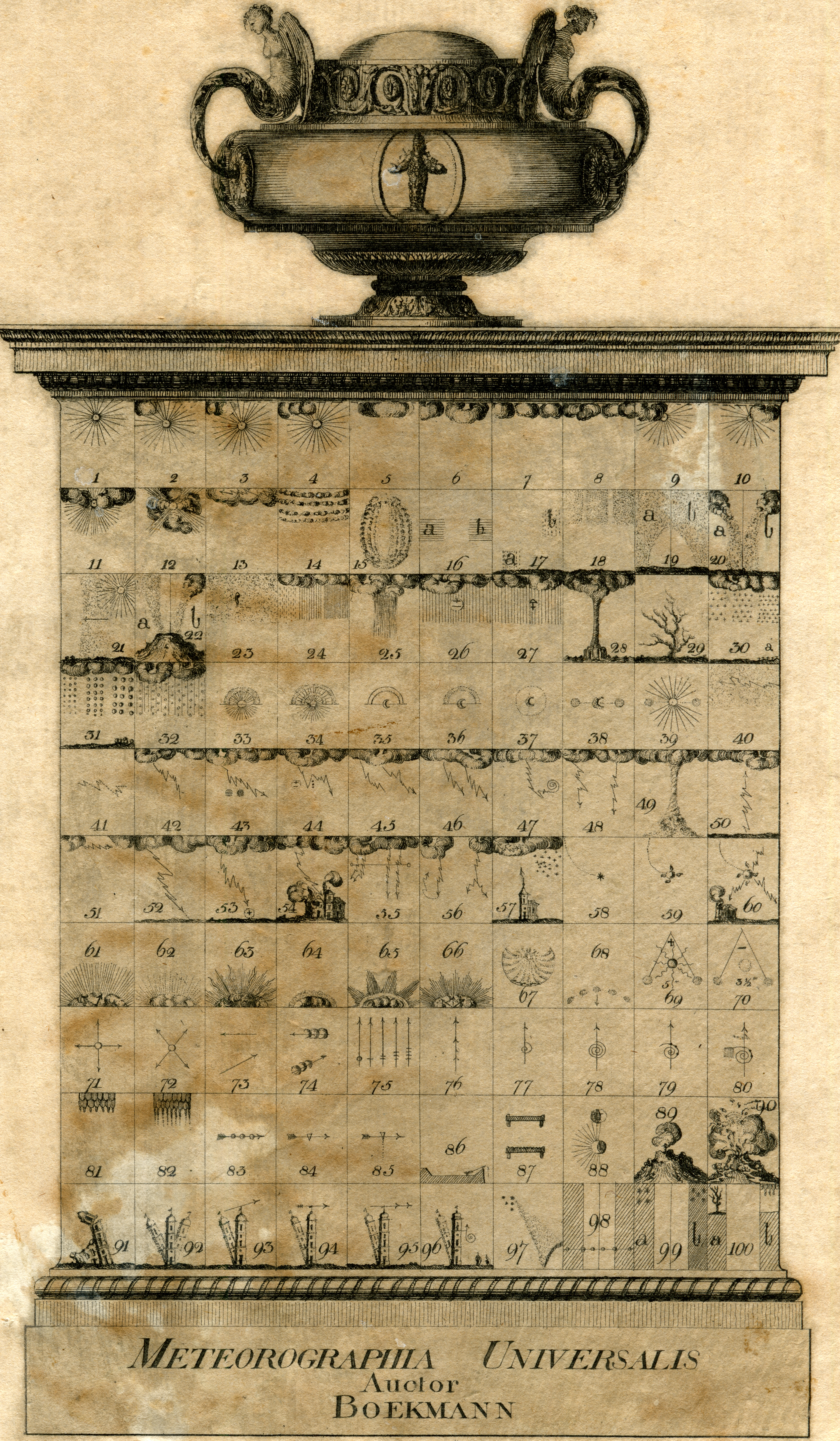 In einem interessanten Beitrag von H. Hertz ist in Meteorologischen Zeitschrift (1887, 4. Jahrgang) wird auf wiedergefundene Abbildungen von J.L. Böckmann, die sogenannte ,,Meteorographia Universalis auctore Boeckmann’’ verwiesen. Auch in den Briefen von Johann Wolfgang von Goethe findet sich mehrfach ein Hinweis auf diese Arbeiten Böckmanns.